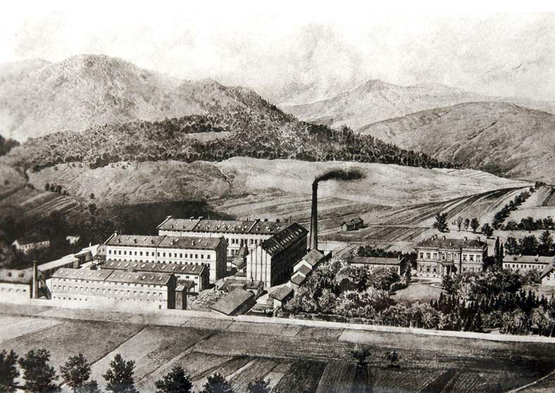 Továrna firmy Thonet v Bystřici pod Hostýnem kolem roku 1890.